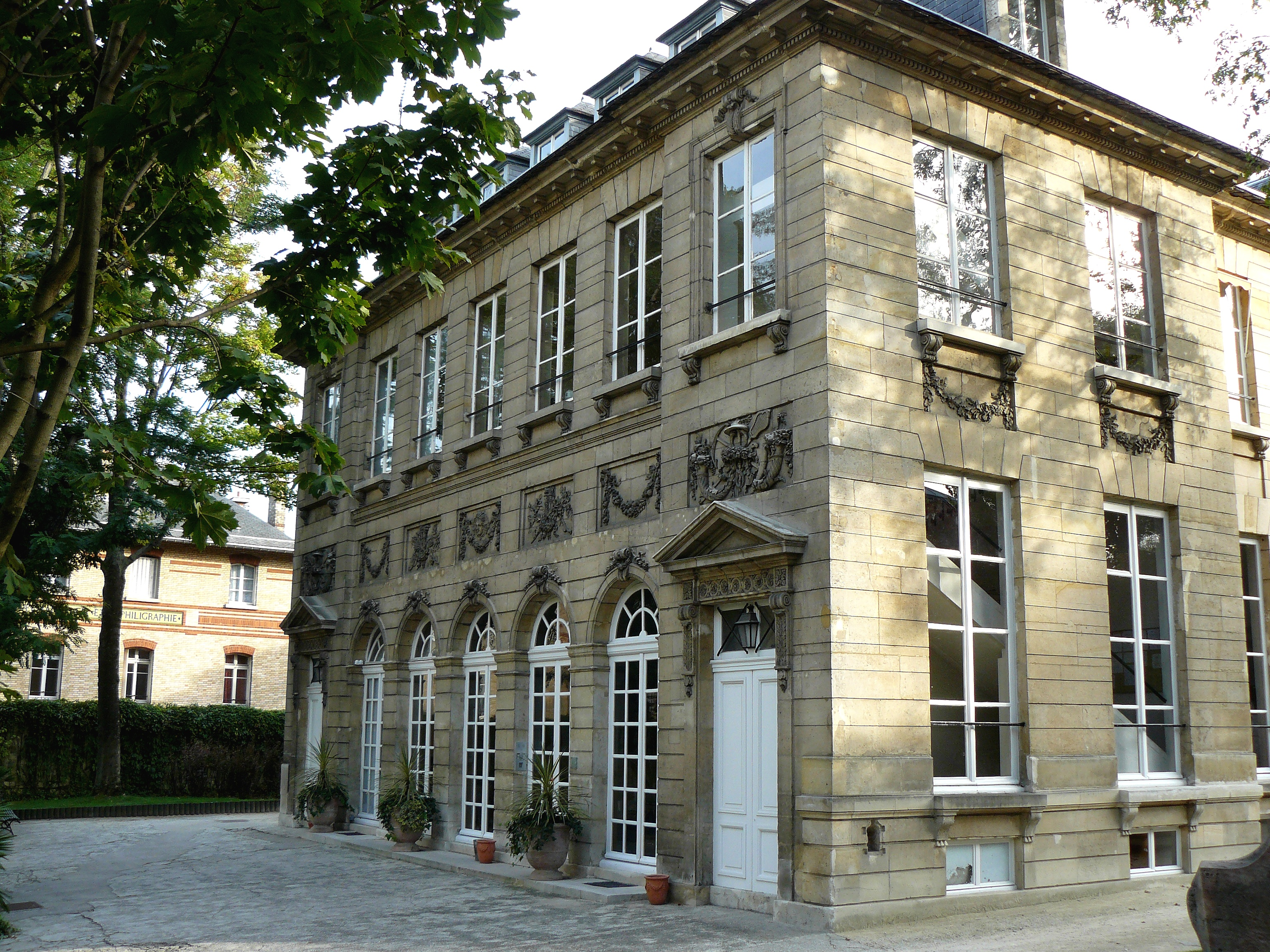 Hôtel de Massa - 35 rue du Faubourg-Saint-Jacques (Paris 14e) - Siège de la Société des Gens de Lettres - Façade arrière servant d'entrée, la façade principale est tournée vers les jardins de l'Observatoire.